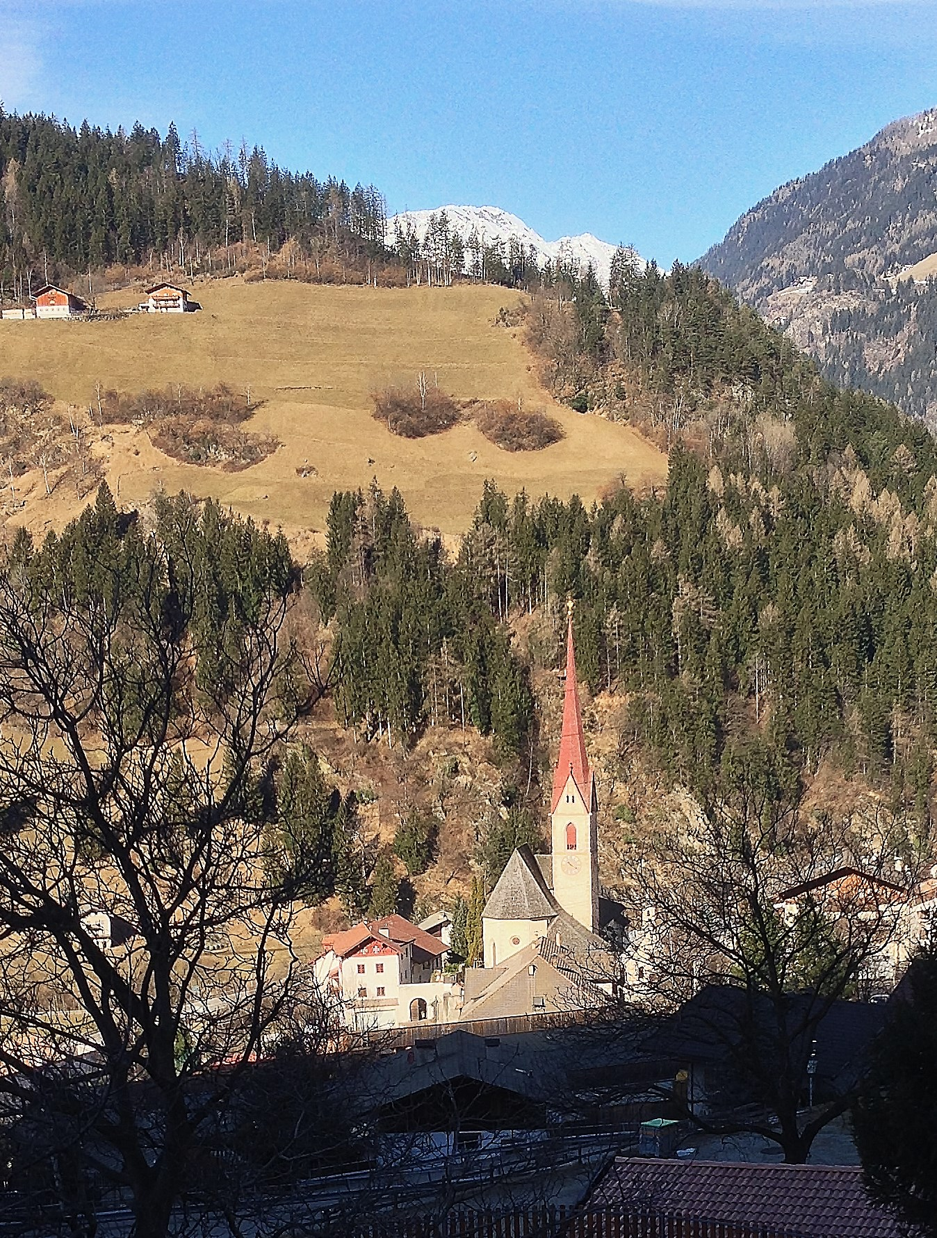 St. Leonhard in Passeier (Südtirol/Italien)